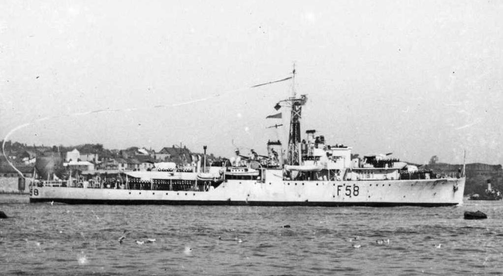 Die britische Sloop Hart (U58)